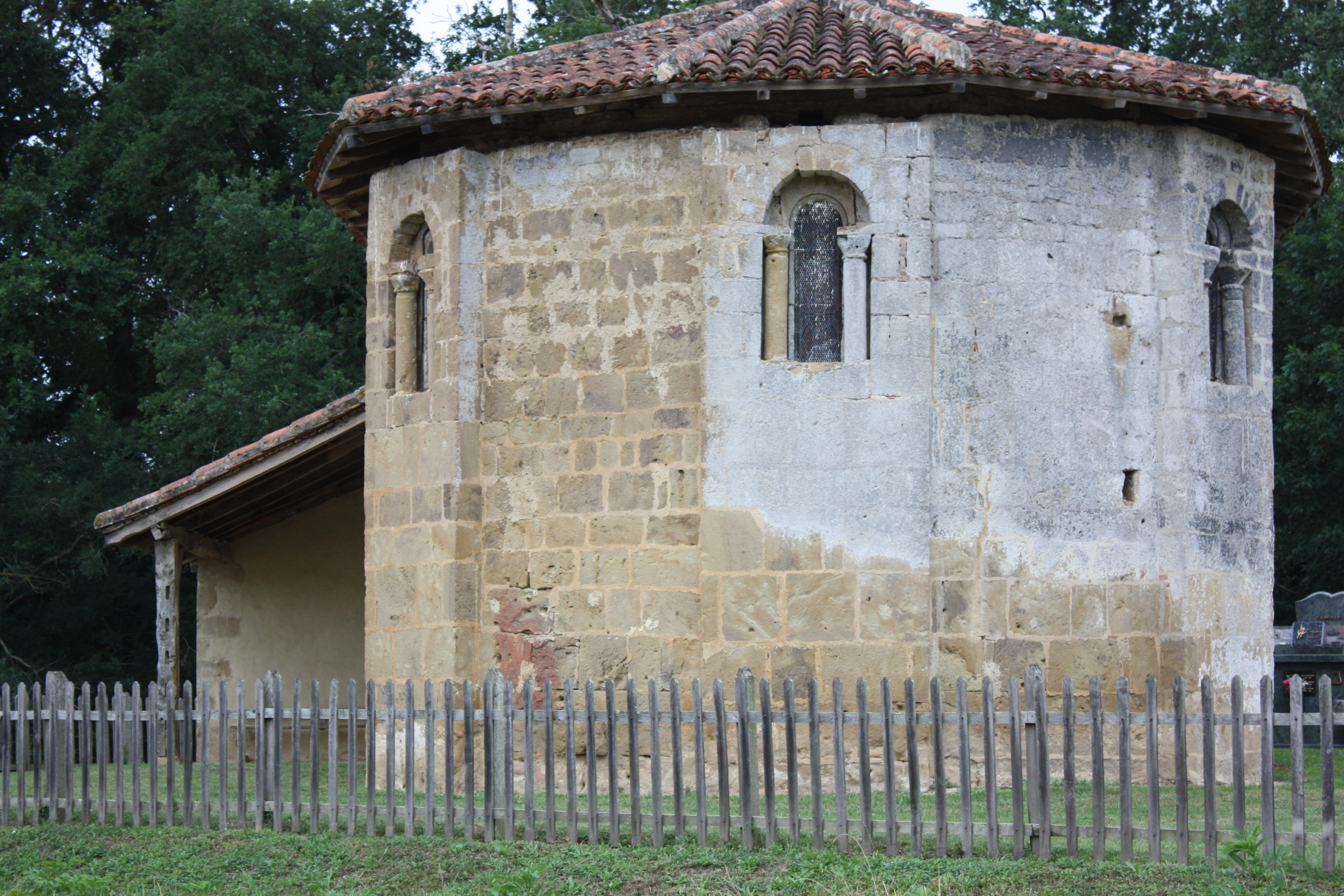 Belloc-Saint-Clamens - Eglise Saint-Clamens Abside